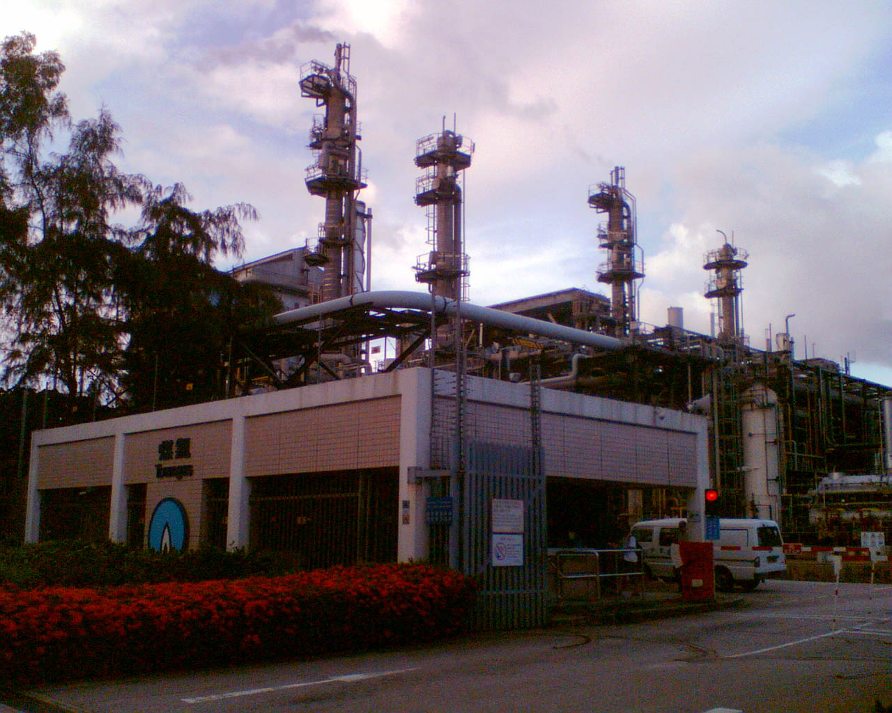 位於zh:大埔工業園的煤氣廠